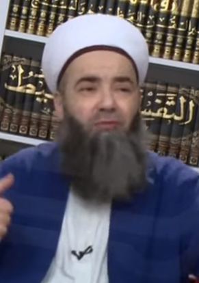 Ahmet Mahmut Ünlü olarak tanınan Cübbeli Ahmet Hoca